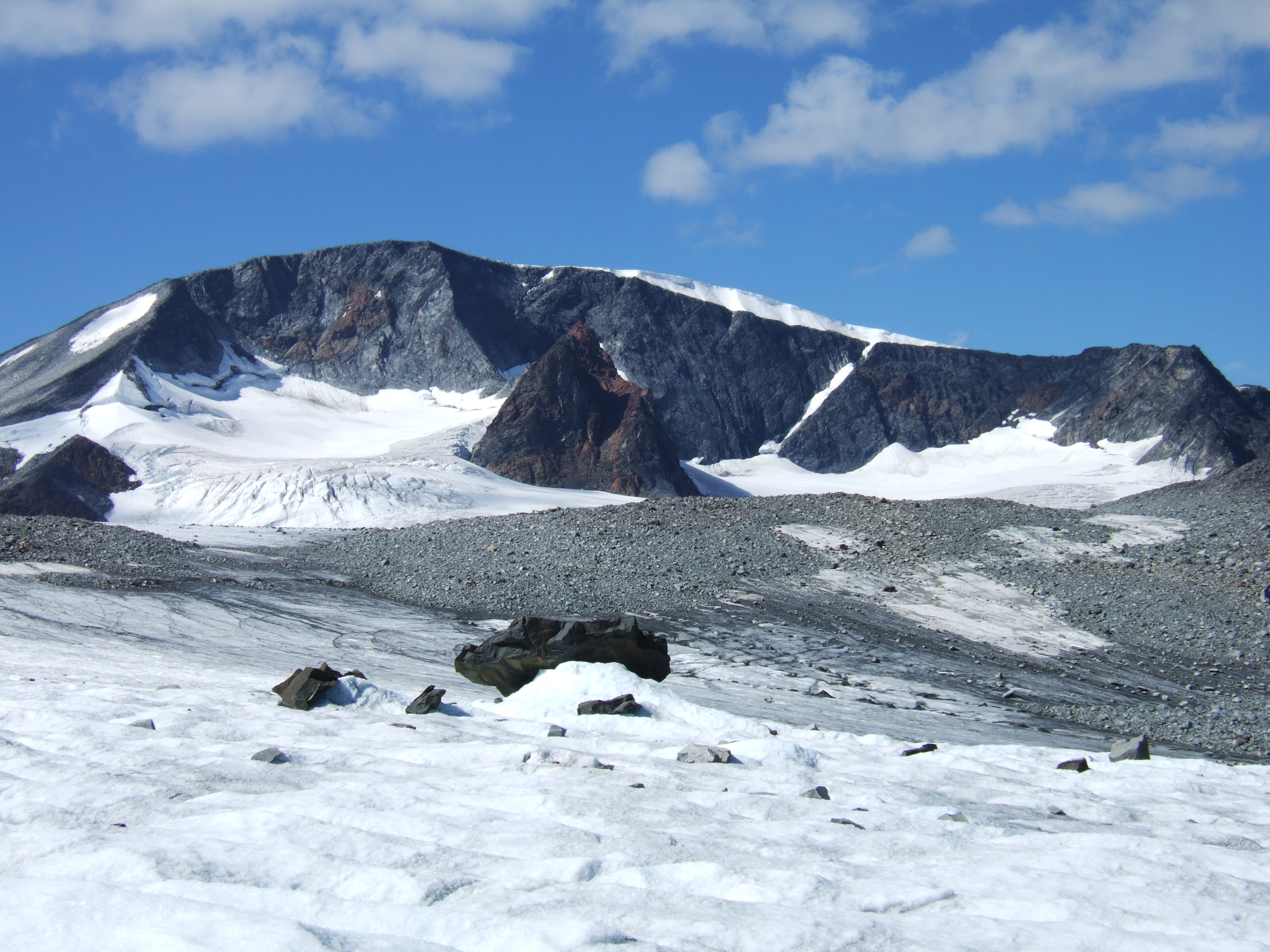 Veobreahesten sett fra Veobrean, Jotunheimen.